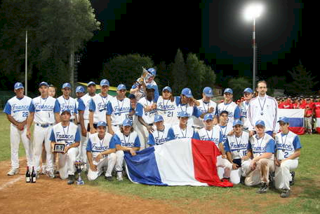 Photo de l'équipe de France Espoirs de baseball 2006, vice-championne d'Europe. Source : Site officiel de la Fédération franÃ§aise de Baseball Crédit photo : FFBS Photo laissé libre de droit par la FFBS avec mention obligatoire du crédit photo. Je place ce cliché sous la licence "redistribution àl'identique" avec "attribution", en attente d'un éventuel transfert vers Commons. Extrait de l'échange de mails que j'ai eu avec le service communication de la FFBS. "J'aimerai connaêtre les modalités d'utilisation des "photos disponibles" de l'équipe de France de baseball qui sont proposées sur le site le FFBS. Puis-je utiliser l'une d'elles pour illustrer l'article consacré àl'équipe de France de baseball sur wikipédia.fr?" Réponse de la FFBS : "Sans aucun problème. Ces photos sont libres de droits. Je vous demande simplement de mentionner Â« Crédit photo : FFBS Â» "